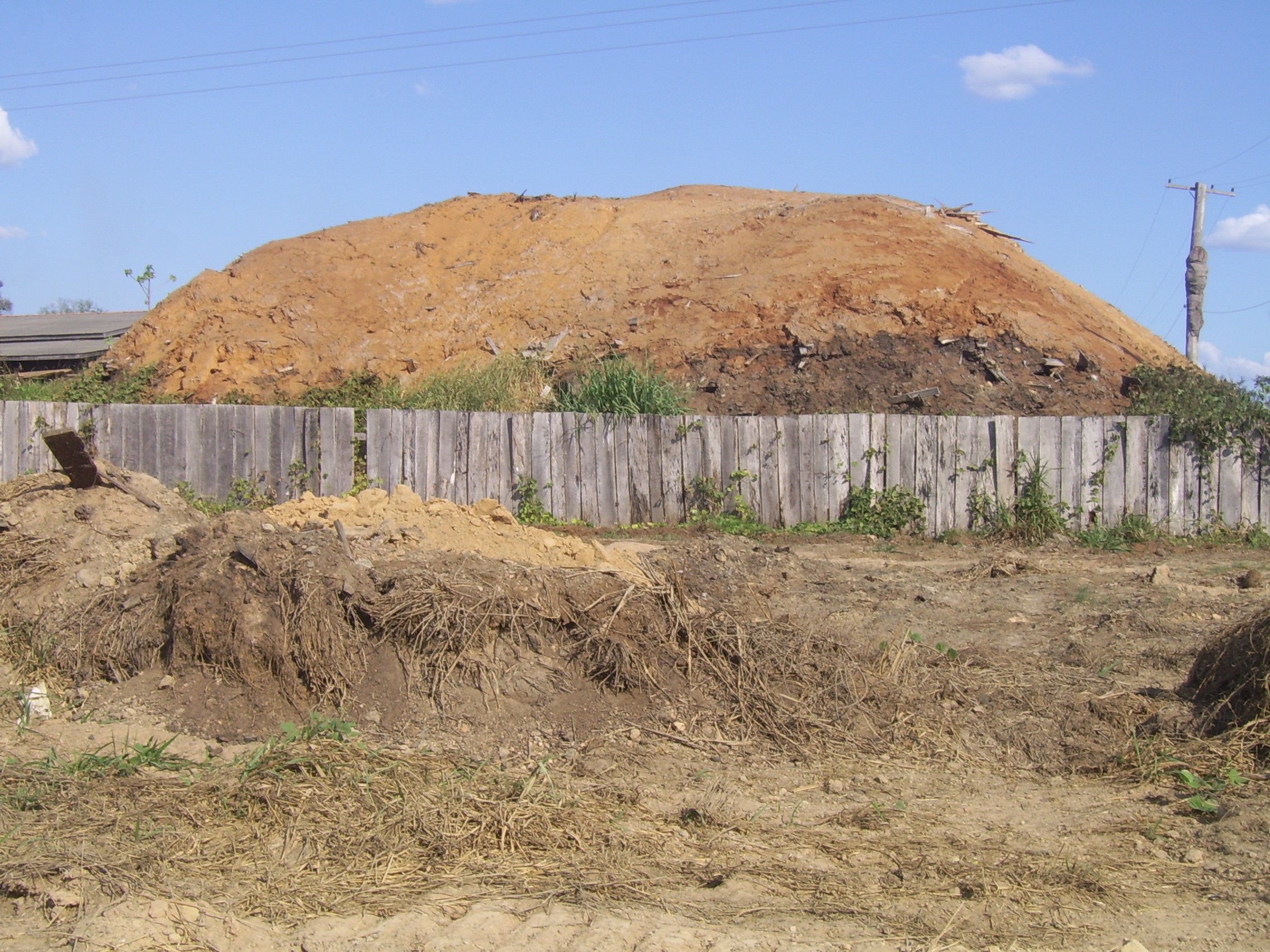 Grande Monte de serragem.